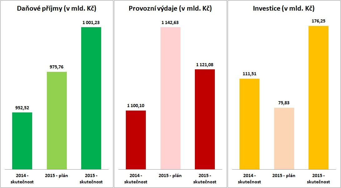 Vývoj daňových příjmů, provozních výdajů a investic (v mld. Kč)